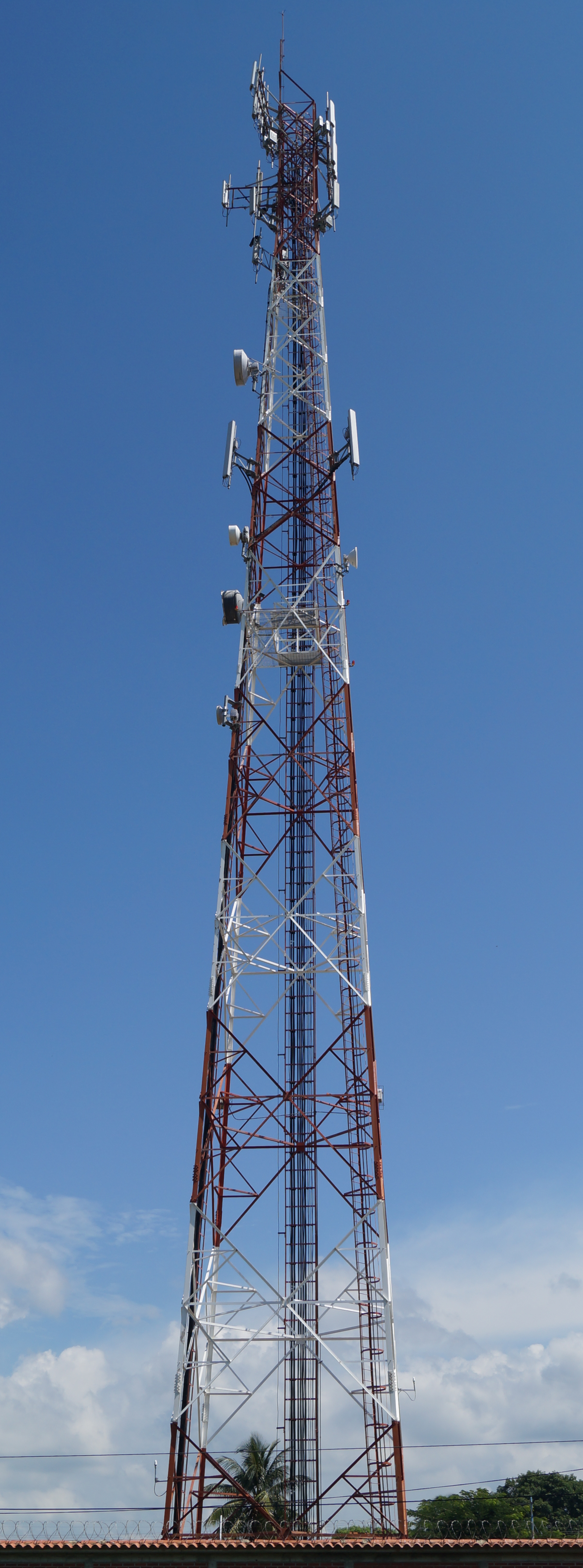 Antena